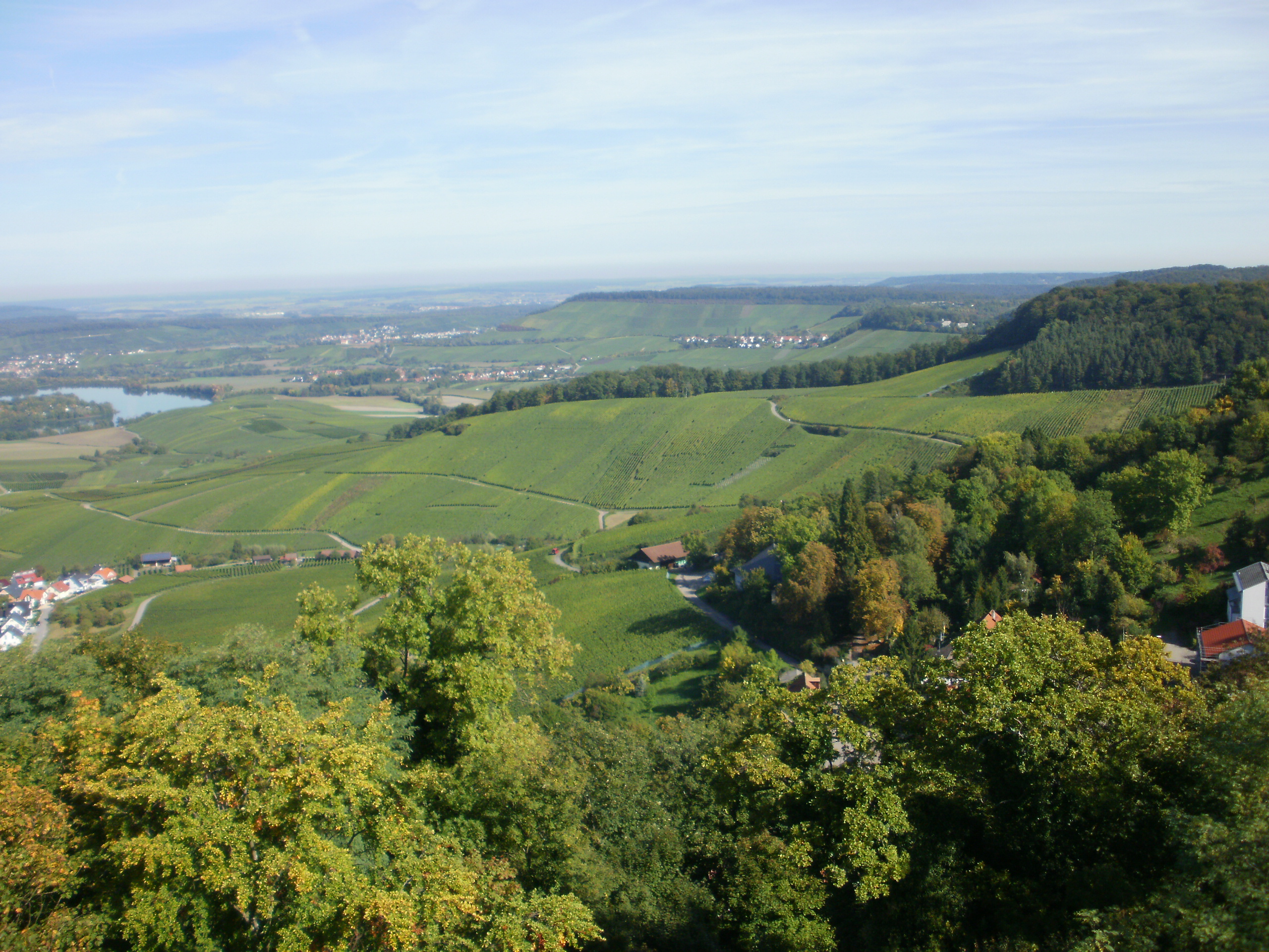 Keuperschichtstufe bei Löwenstein, Deutschland